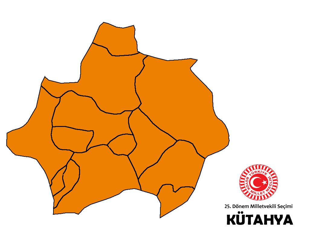 2015 genel seçim sonuçları